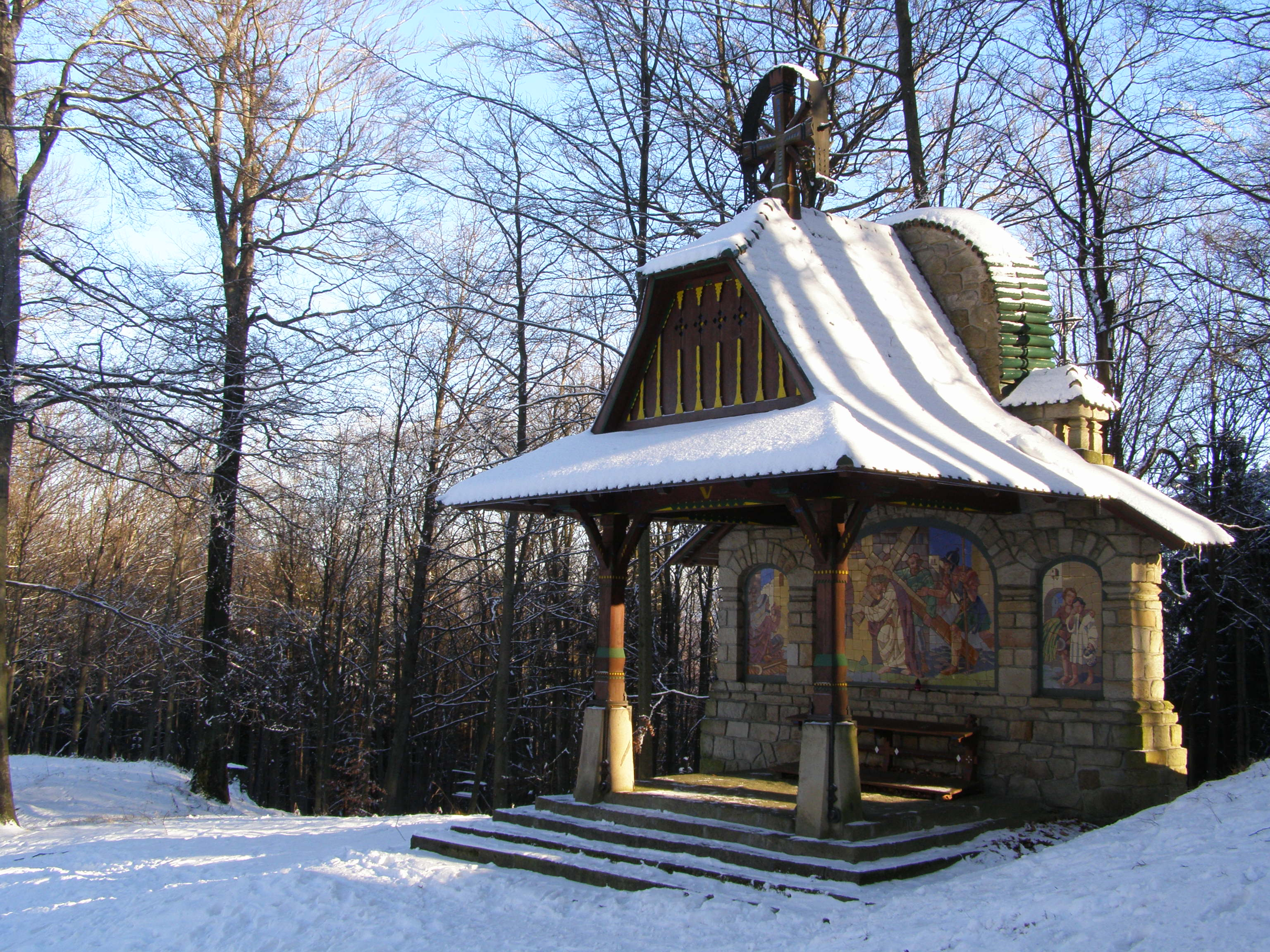 Česky: Hostýn, zastavení křížové cesty